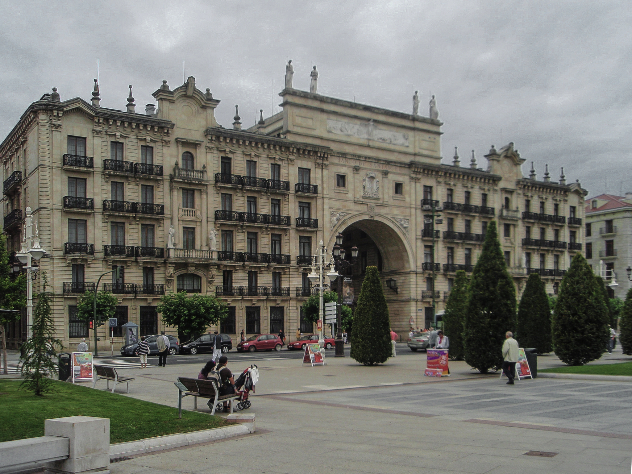 Sede social del Banco Santander en Santander, España.